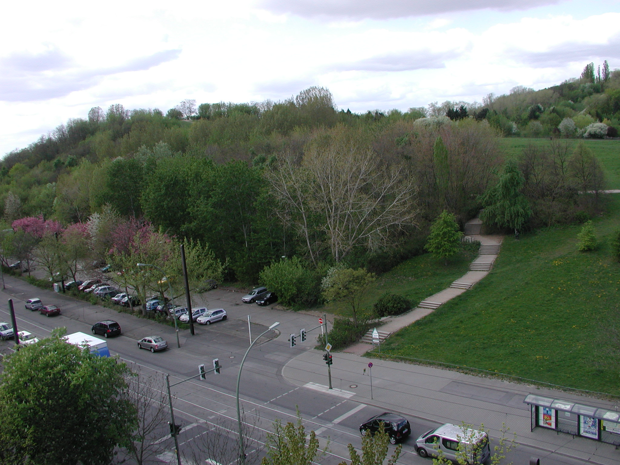 Der Hauptgipfel im Volkspark Prenzlauer Berg